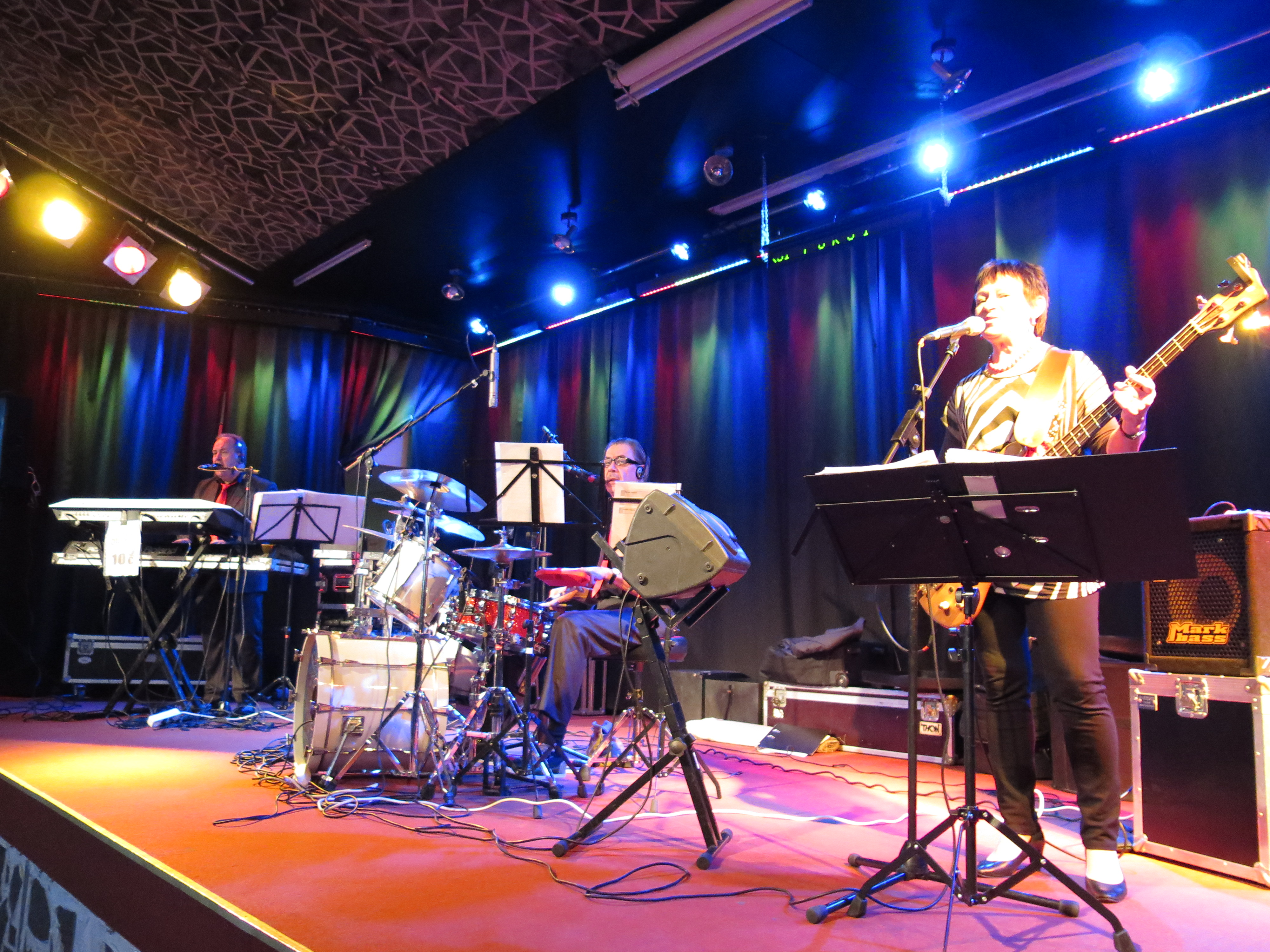 Jarkko Salmi & Sunset yhtye